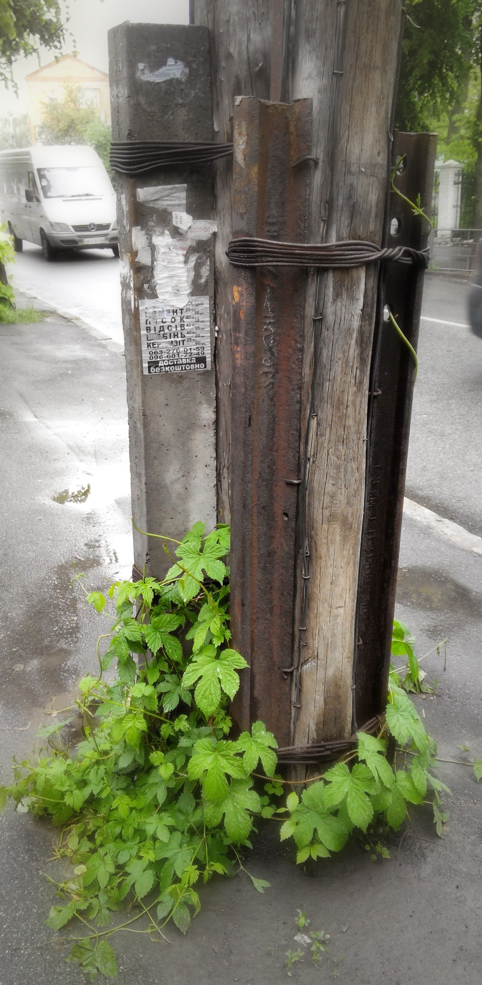 Пасинок (приставка) виконана з рельси (спереду) та бетону (позаду) для ліній електропередач та ліній зв’язку.